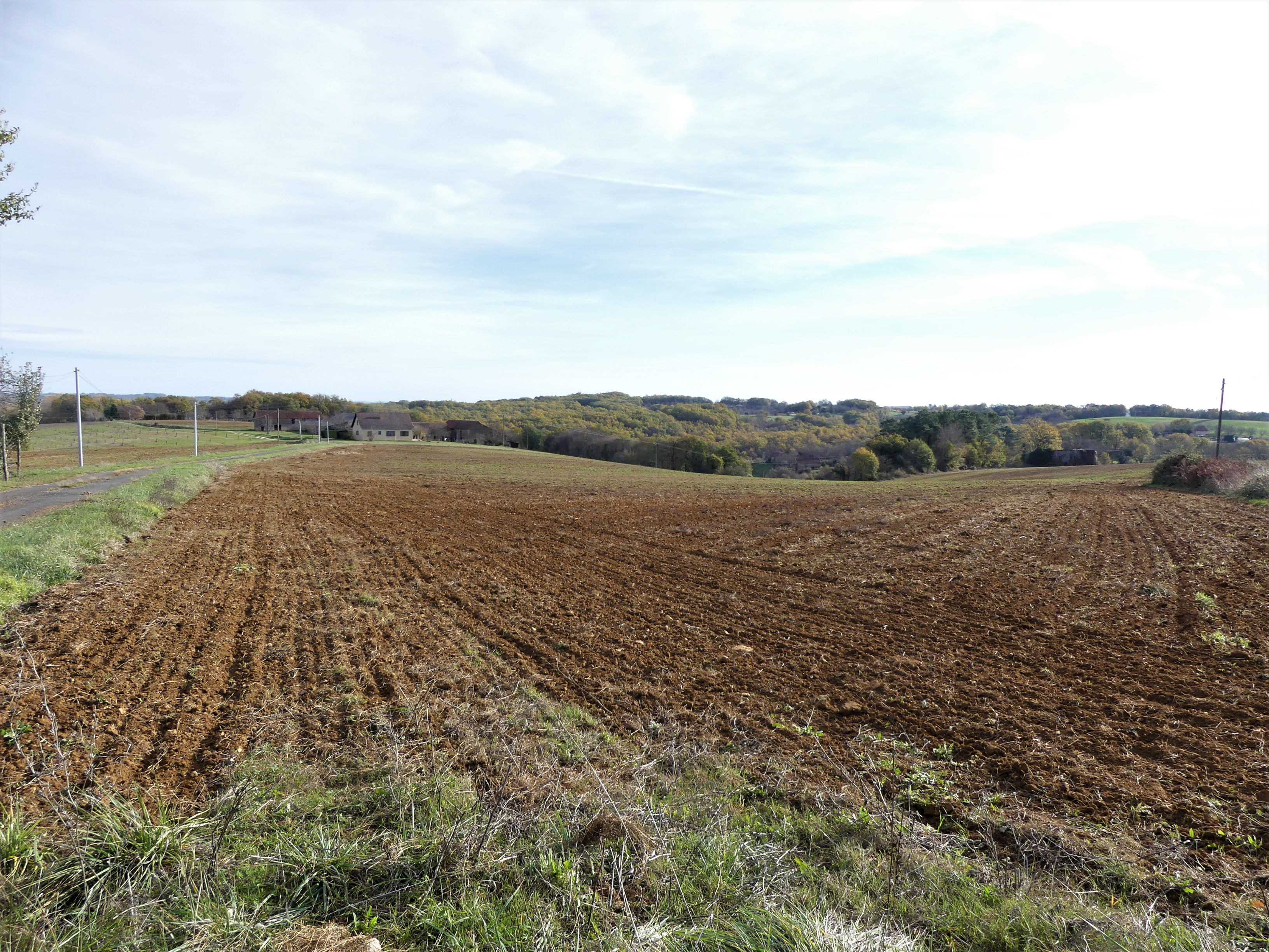 Paysage près de la Genèbre, Saint-Amand-de-Coly, Dordogne, France.